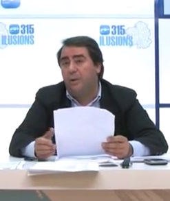 Xulio Ferreiro.